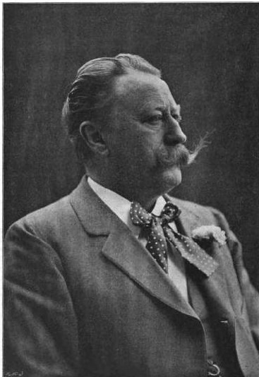 W:de:Conrad Kindermann, Porträtfotografie seines Ateliers Benque &Kindermann, Hamburg; Autotypie von Patzelt & Krampolek, Wien